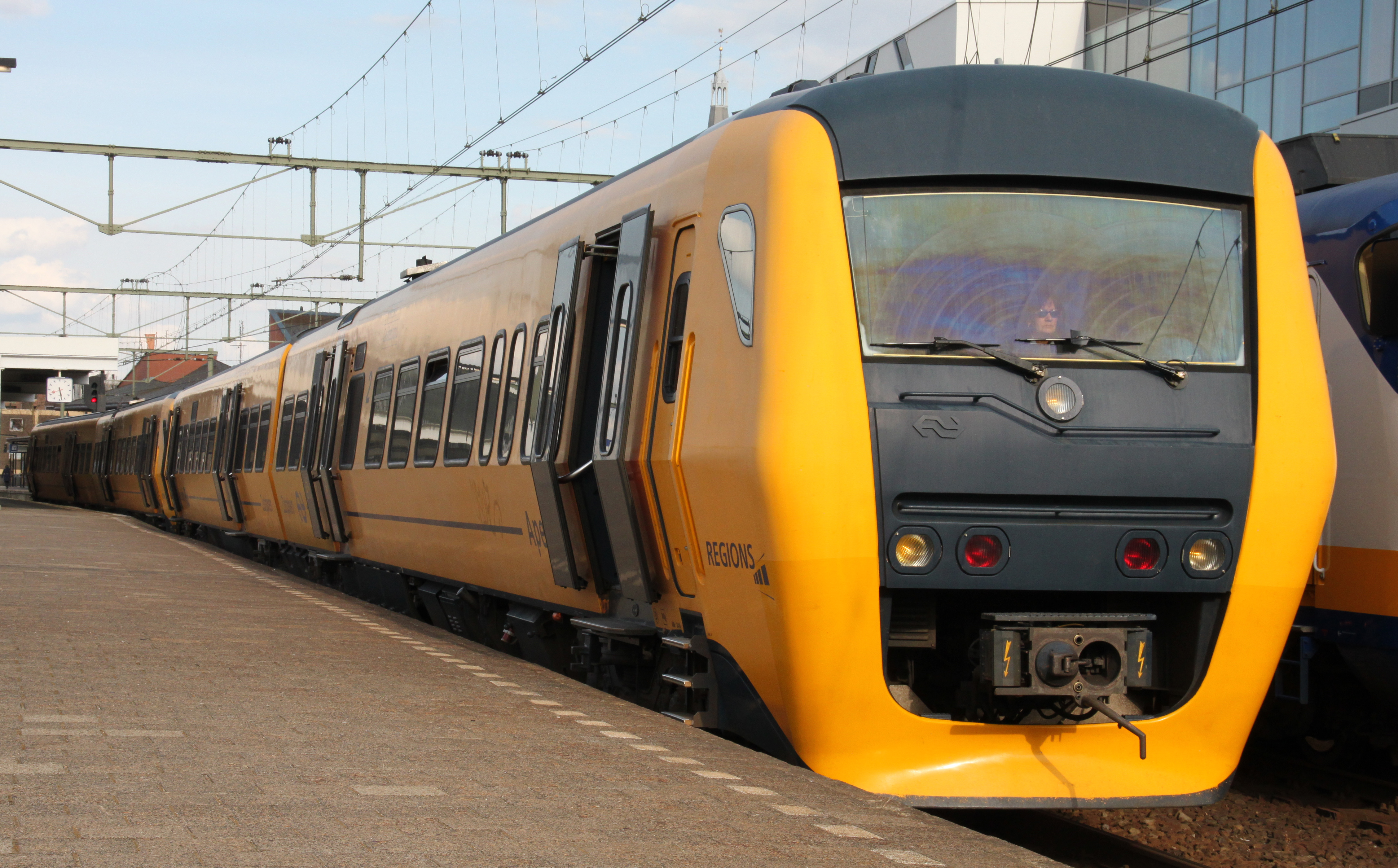 Twee treinstellen type DM '90 te Zutphen, gereed voor vertrek richting Apeldoorn.